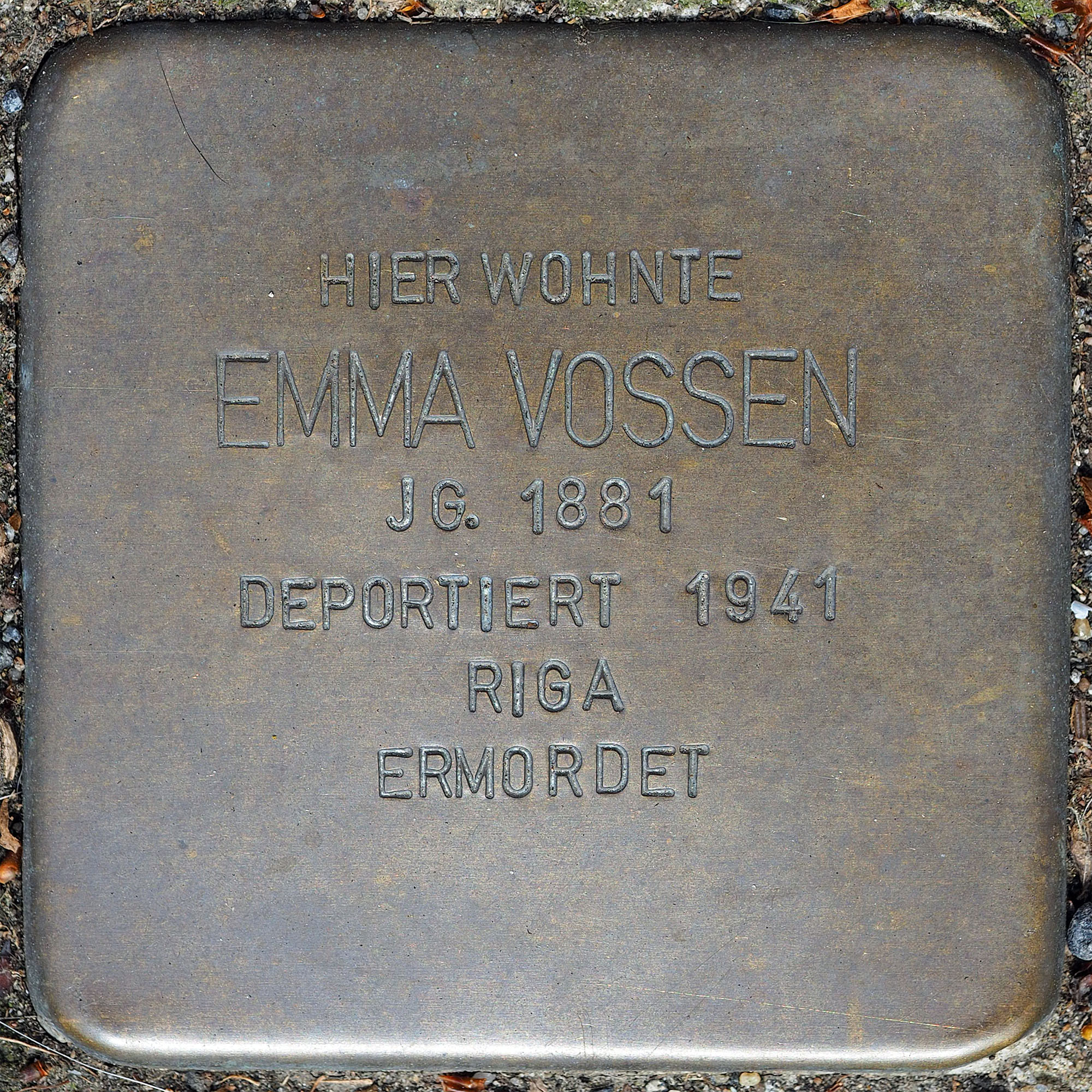 Stolpersteine GV: Vossen, Emma